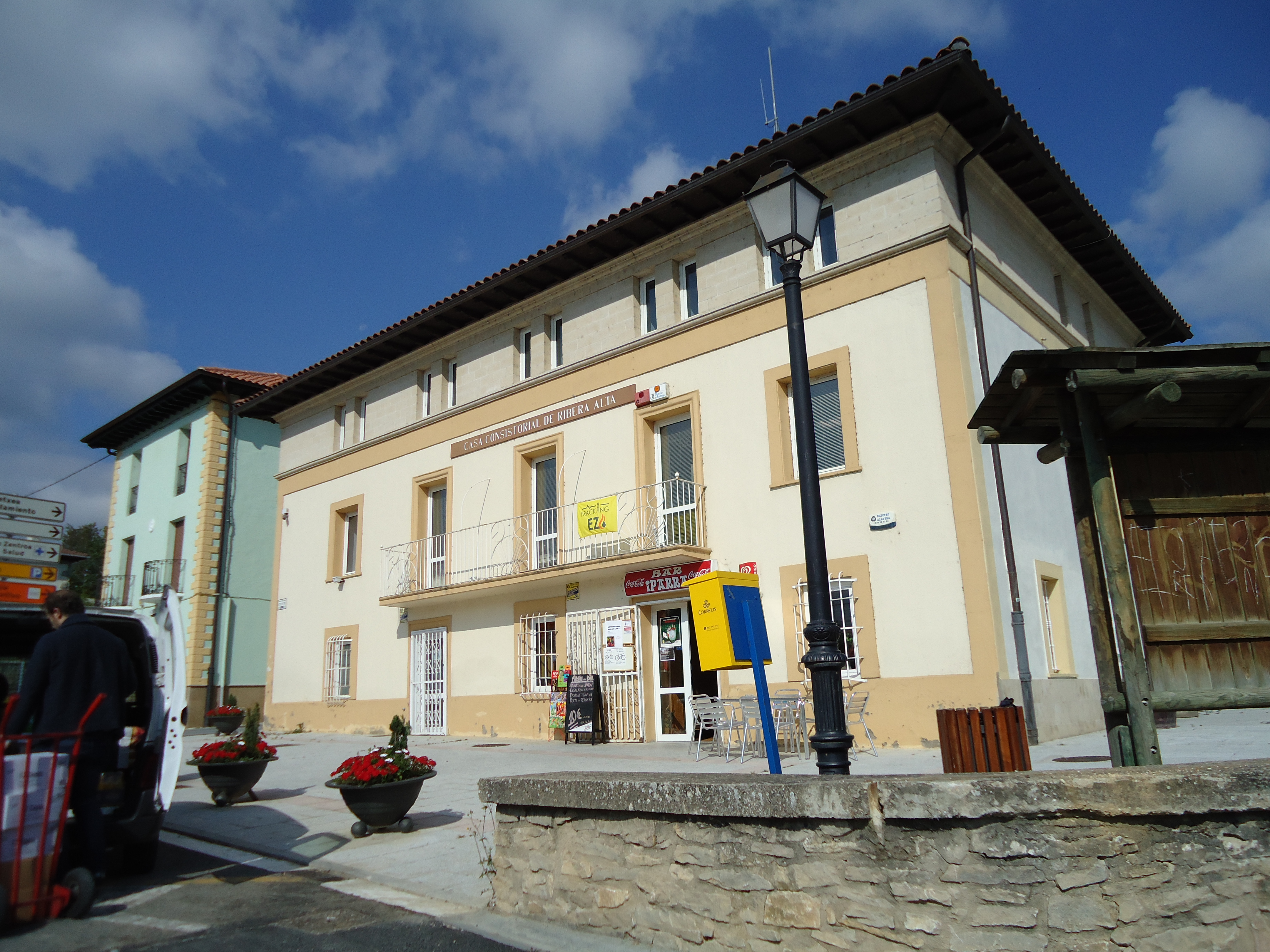 Erriberagoitiko udaletxea